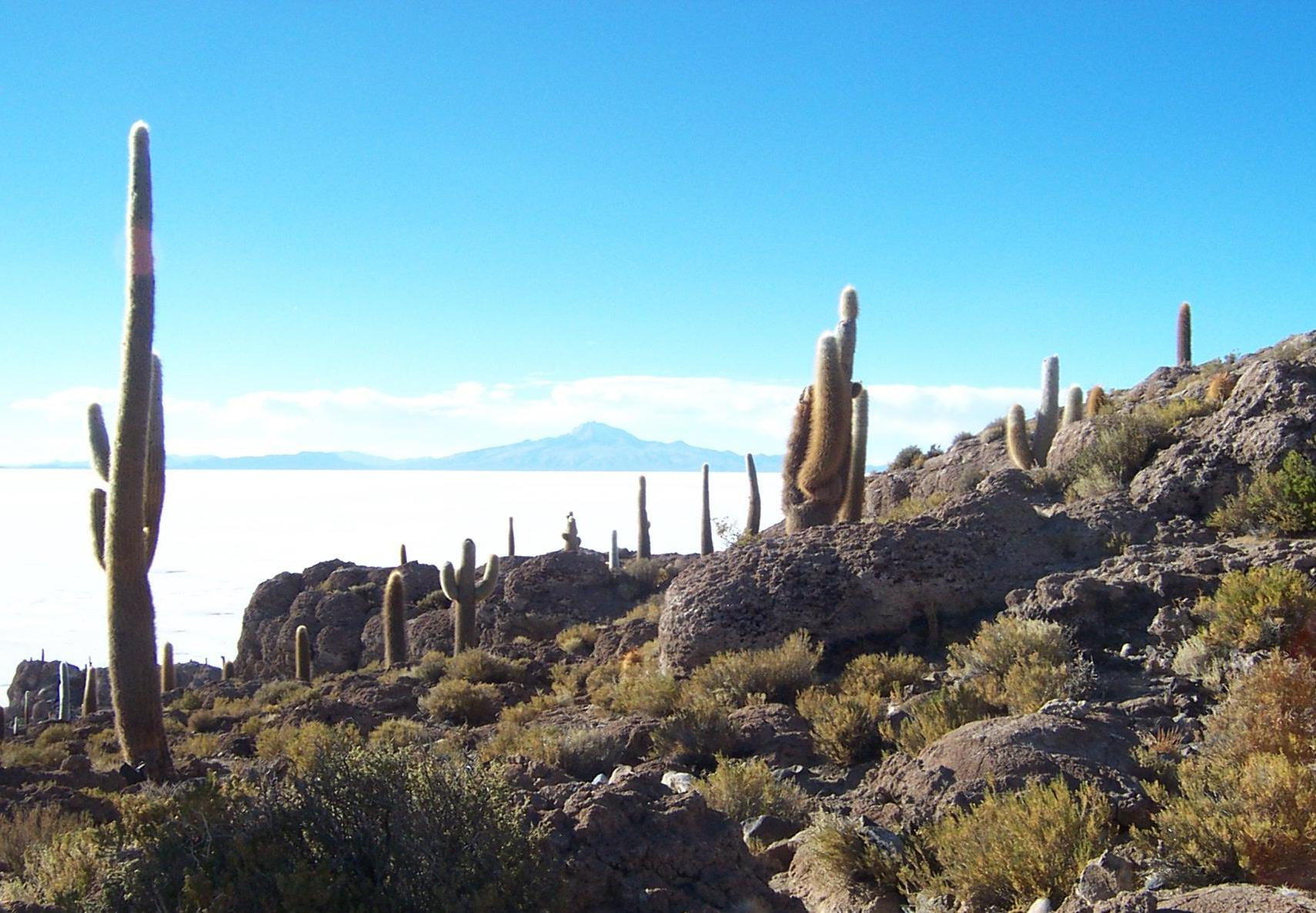 Eigen foto.